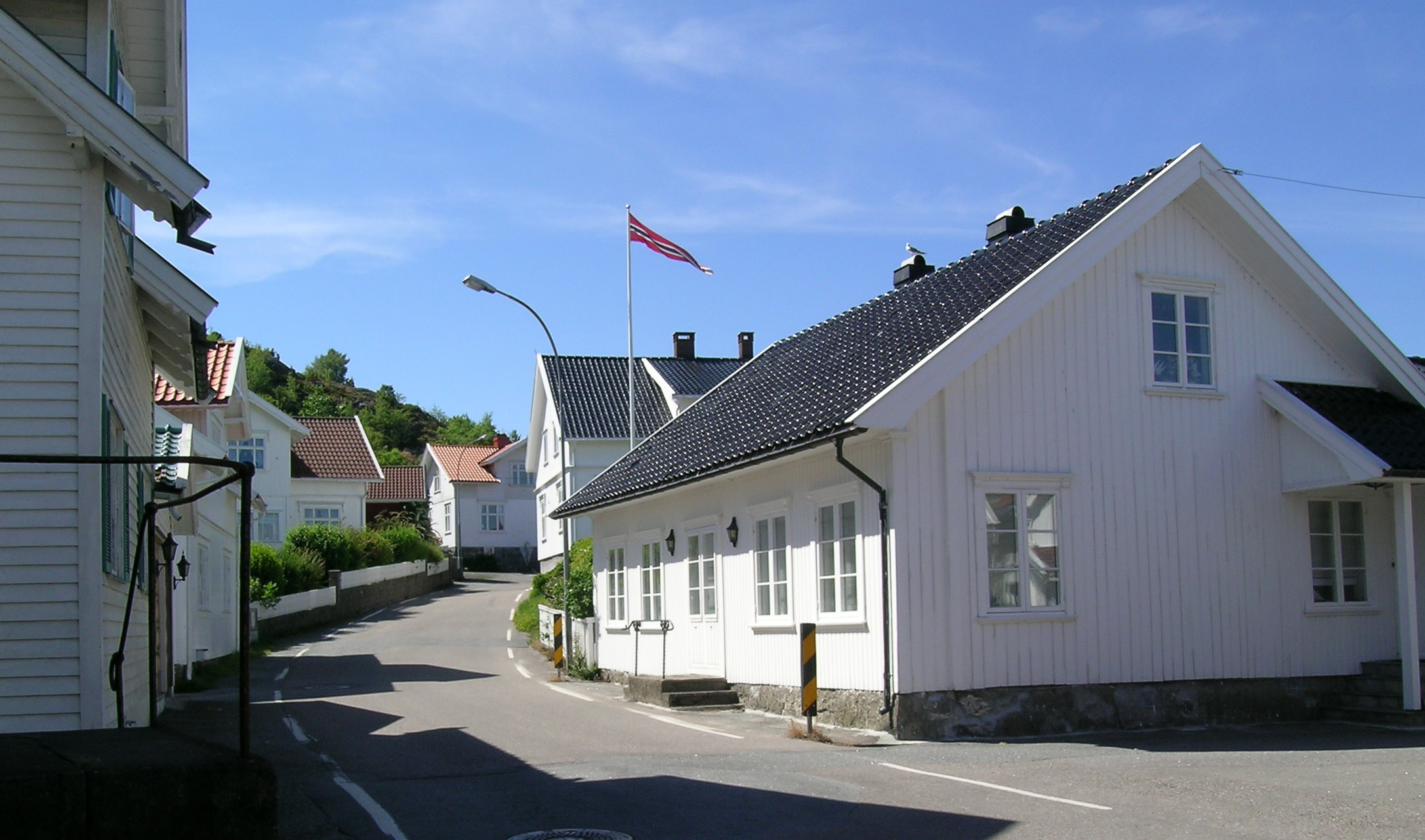 Nevlunghavn, Larvik, Norway.